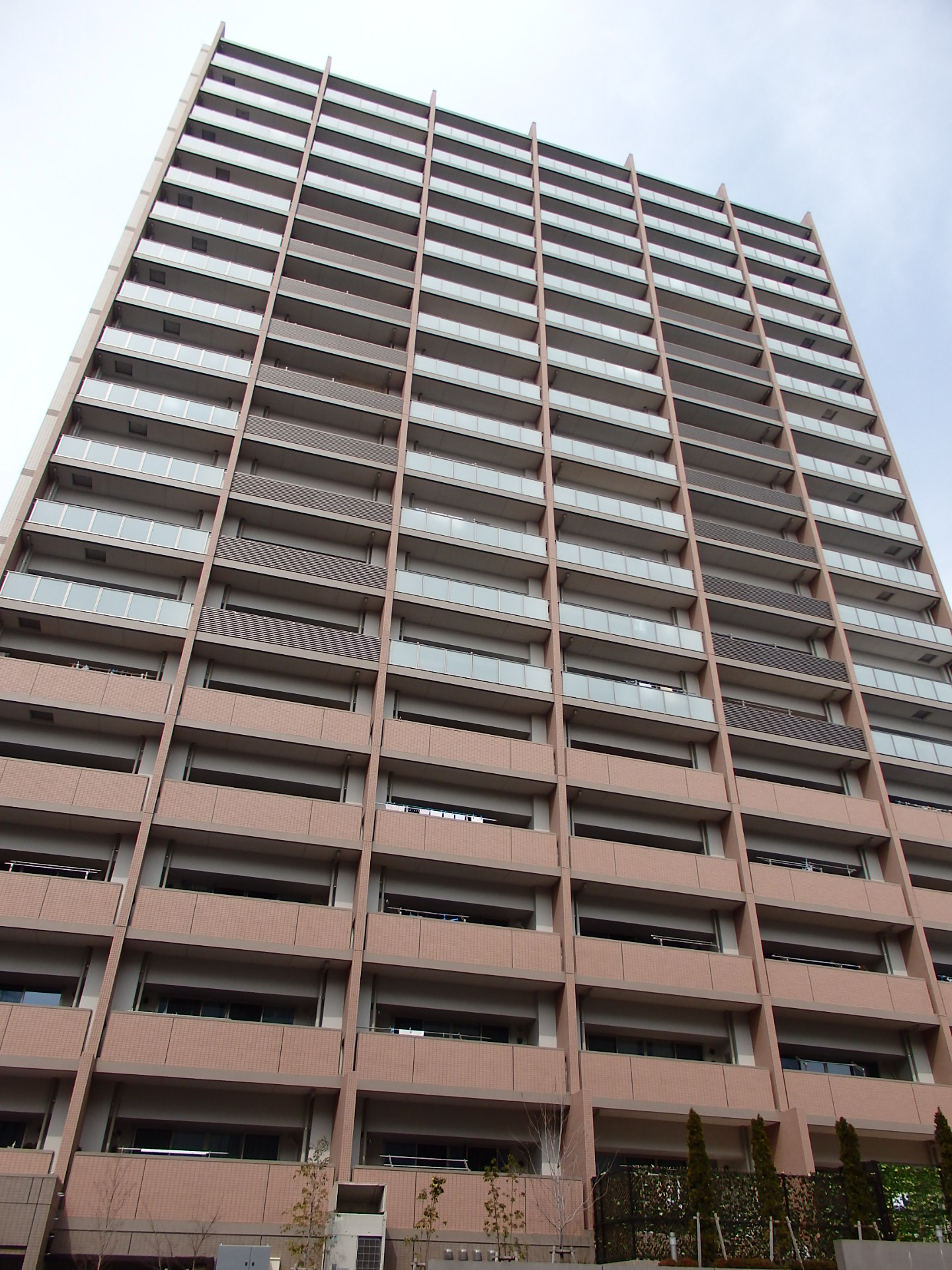 パークホームズ浦和仲町